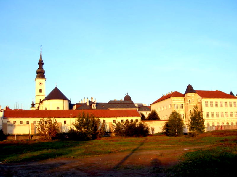 Prešov. Gréckokatolícke arcibiskupstvo. Katedrálny chrám sv. Jána Krstiteľa. Región Šariš.